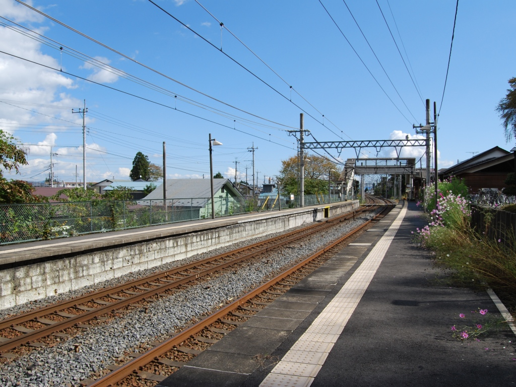 東武鉄道日光線上今市駅ホーム全景（2008/10/28撮影）